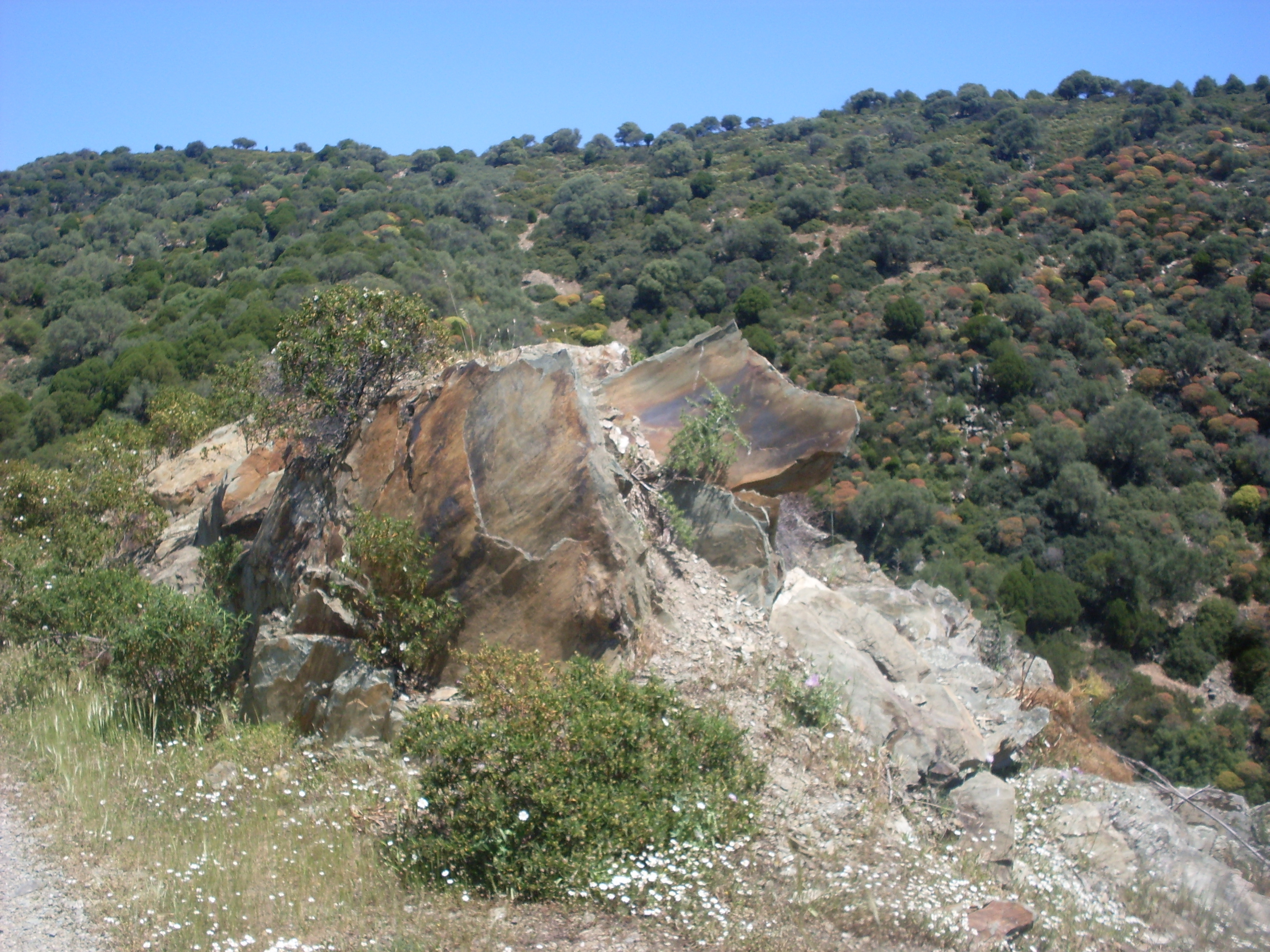 Scisti metamorfici della Formazione di Nebida (Cambriano inferiore). Teulada (Sardegna), presso Furriadroxiu Basoccu.